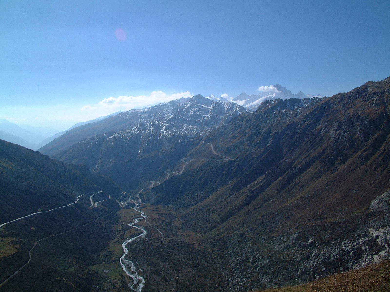 Furka Pass - Blick nach Gletsch und Grimselpass